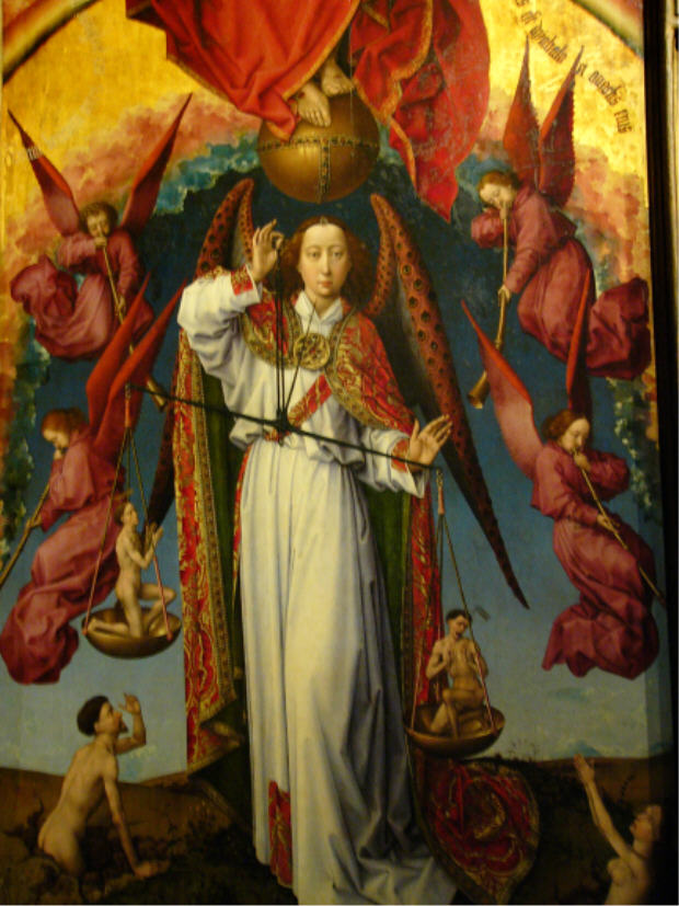 Detail aus dem Polyptychon Rogier van der Weydens im Hôtel-Dieu